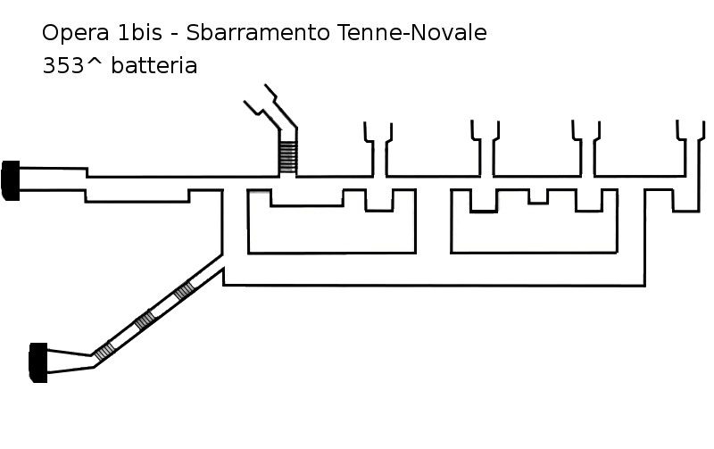 mappa opera 1 bis tenne